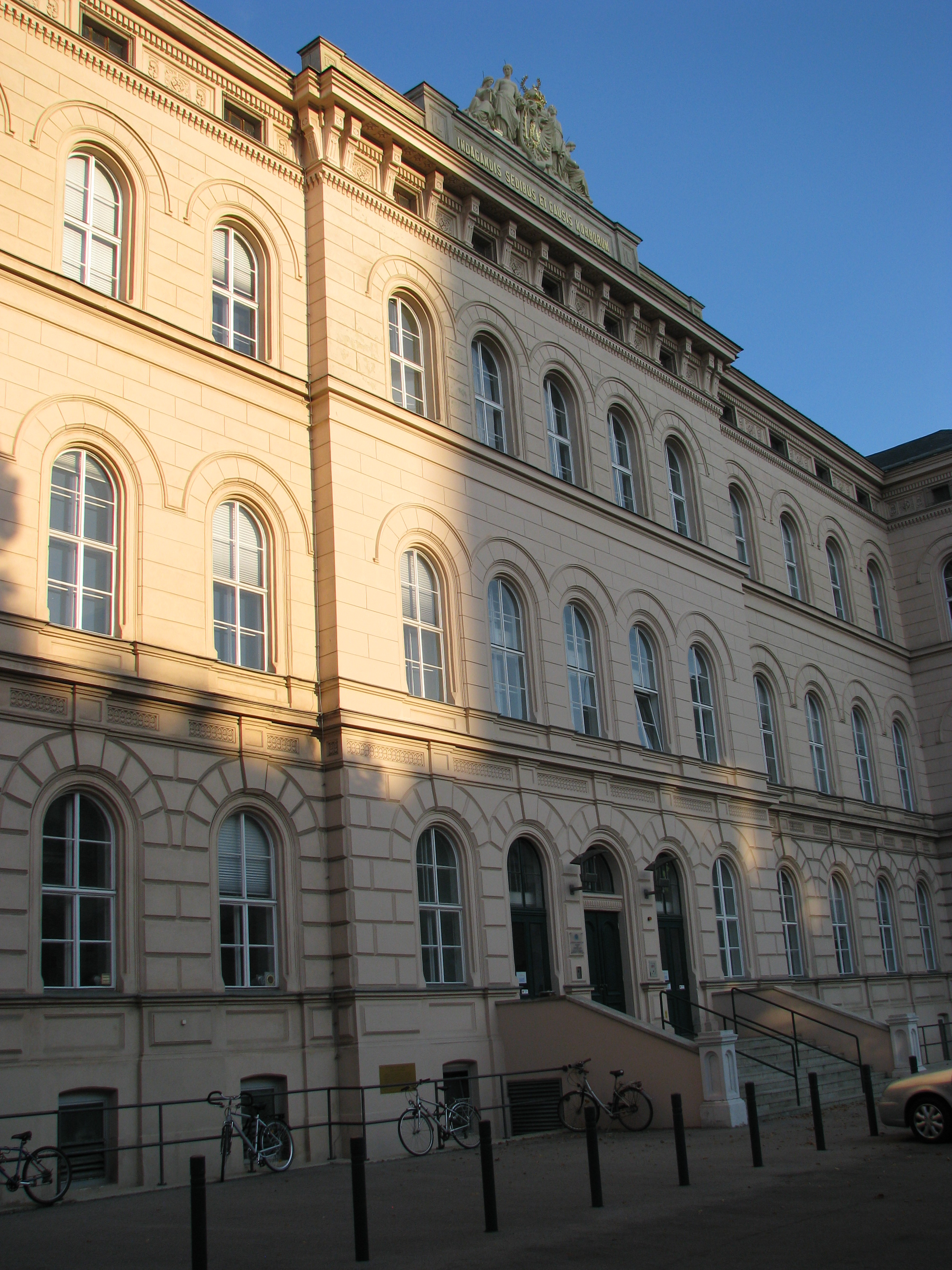 Pathologisch-Anatomisches Institut